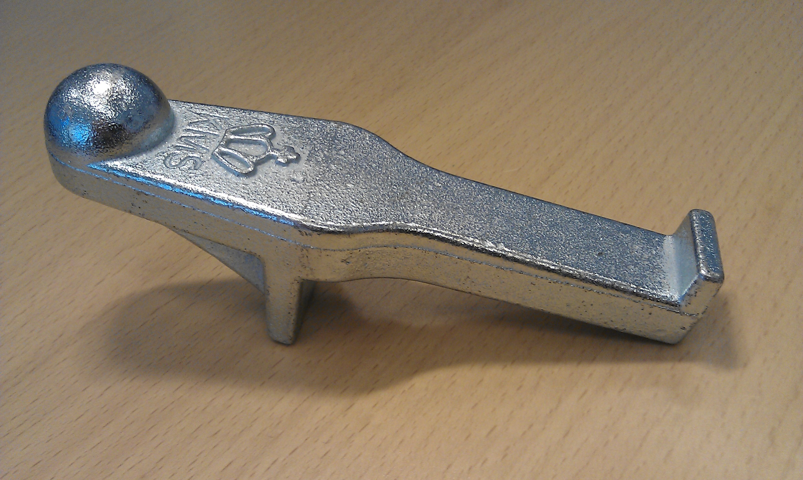 Fikspunkt, før indmuring i felten. Med det ny (fra 2011) KMS logo.